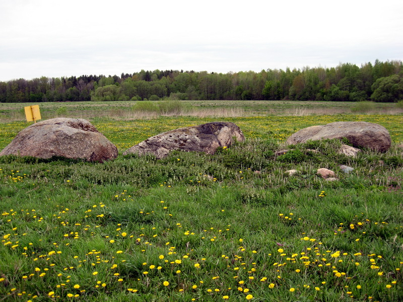 Тапілішкі. Група валуноў тапілішкінская